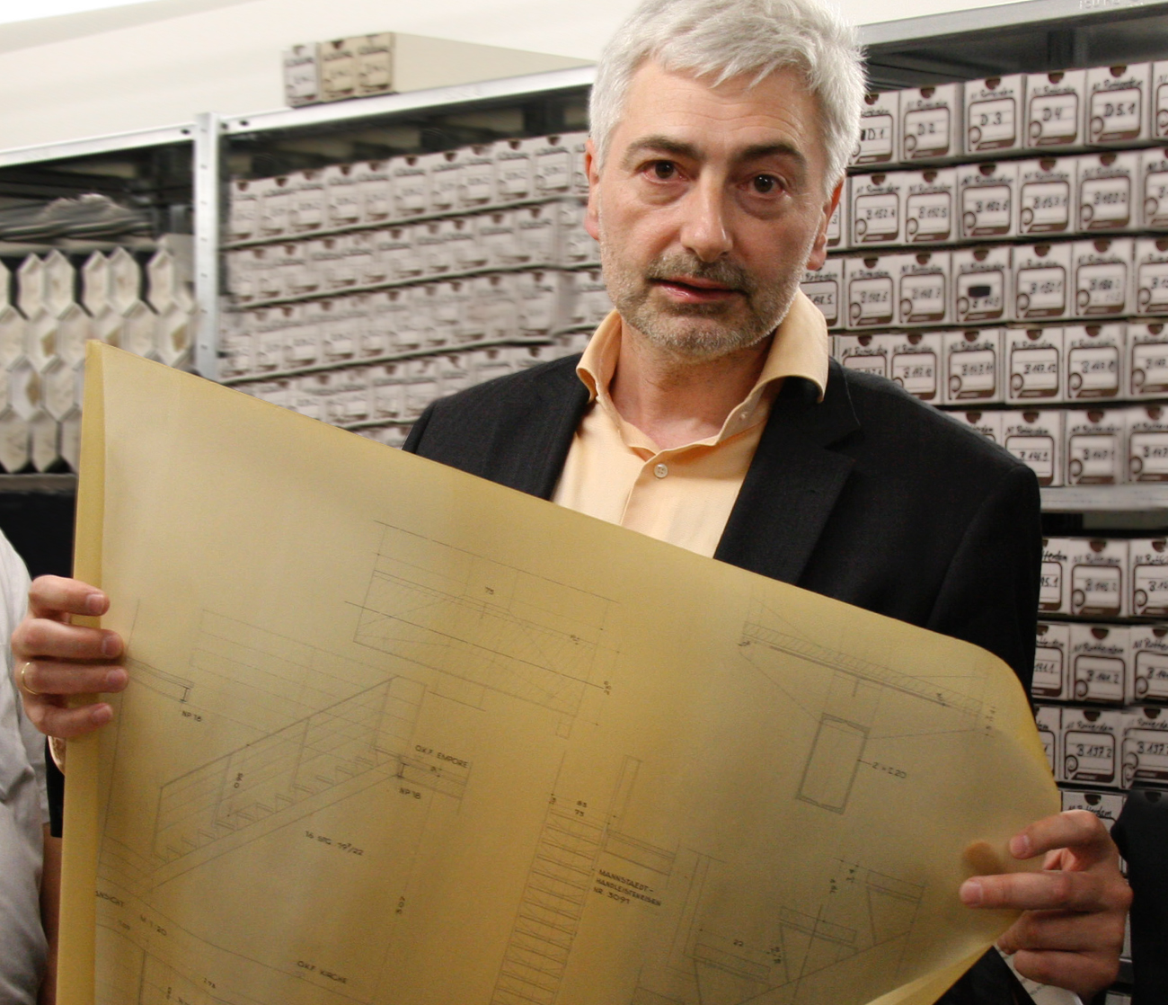 Ulrich Helbach, Historisches Archiv des Erzbistums Köln, 2011